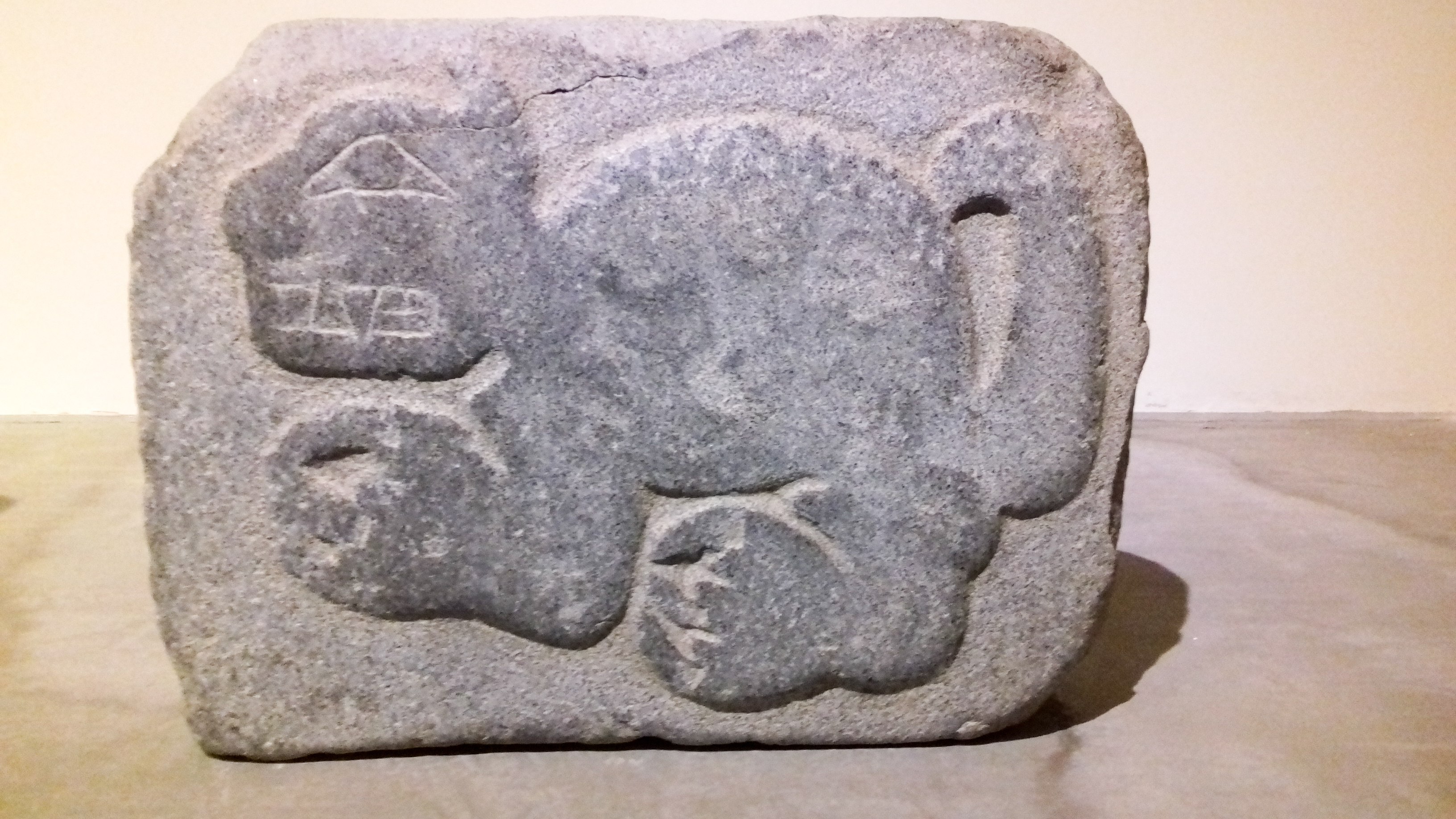 Puma ?